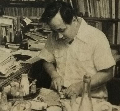 ネギマを作る中村哲